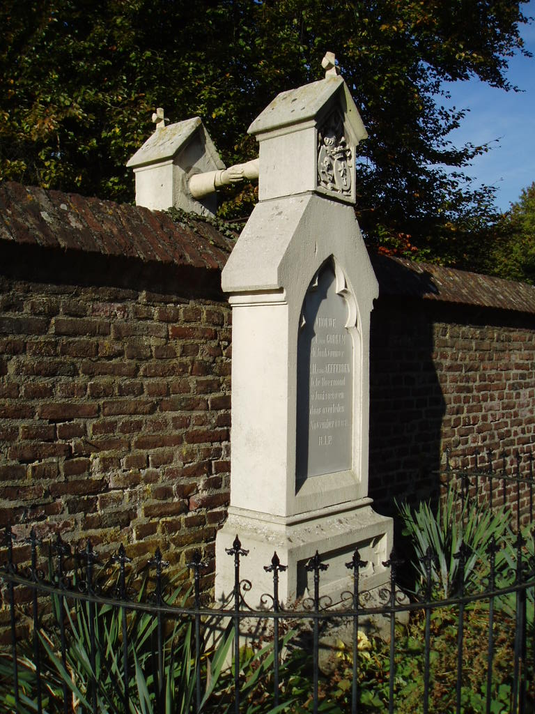 Rijksmonumentenregister 520489